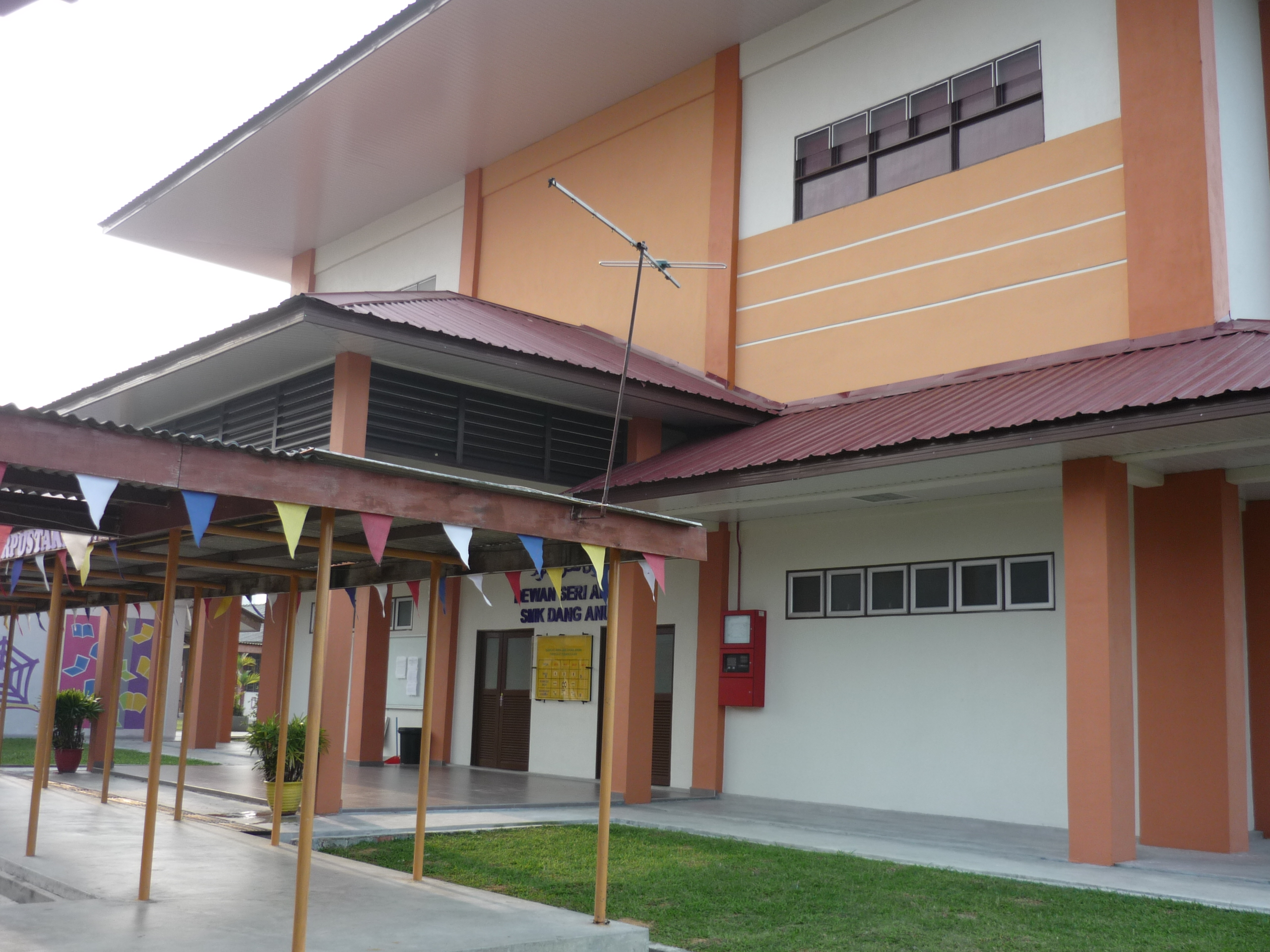 Pandangan Sisi Dewan Seri Anum